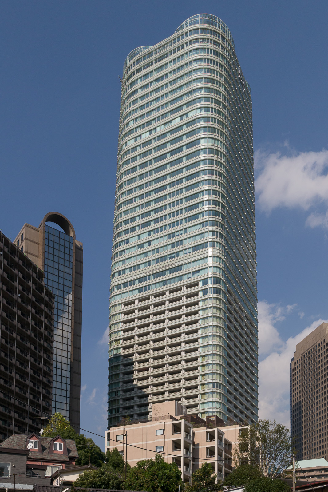 アークヒルズ仙石山森タワー。